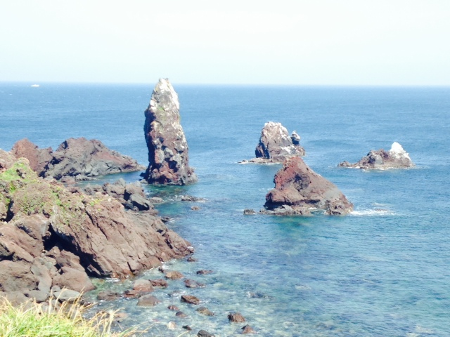 제주도 섭지코지